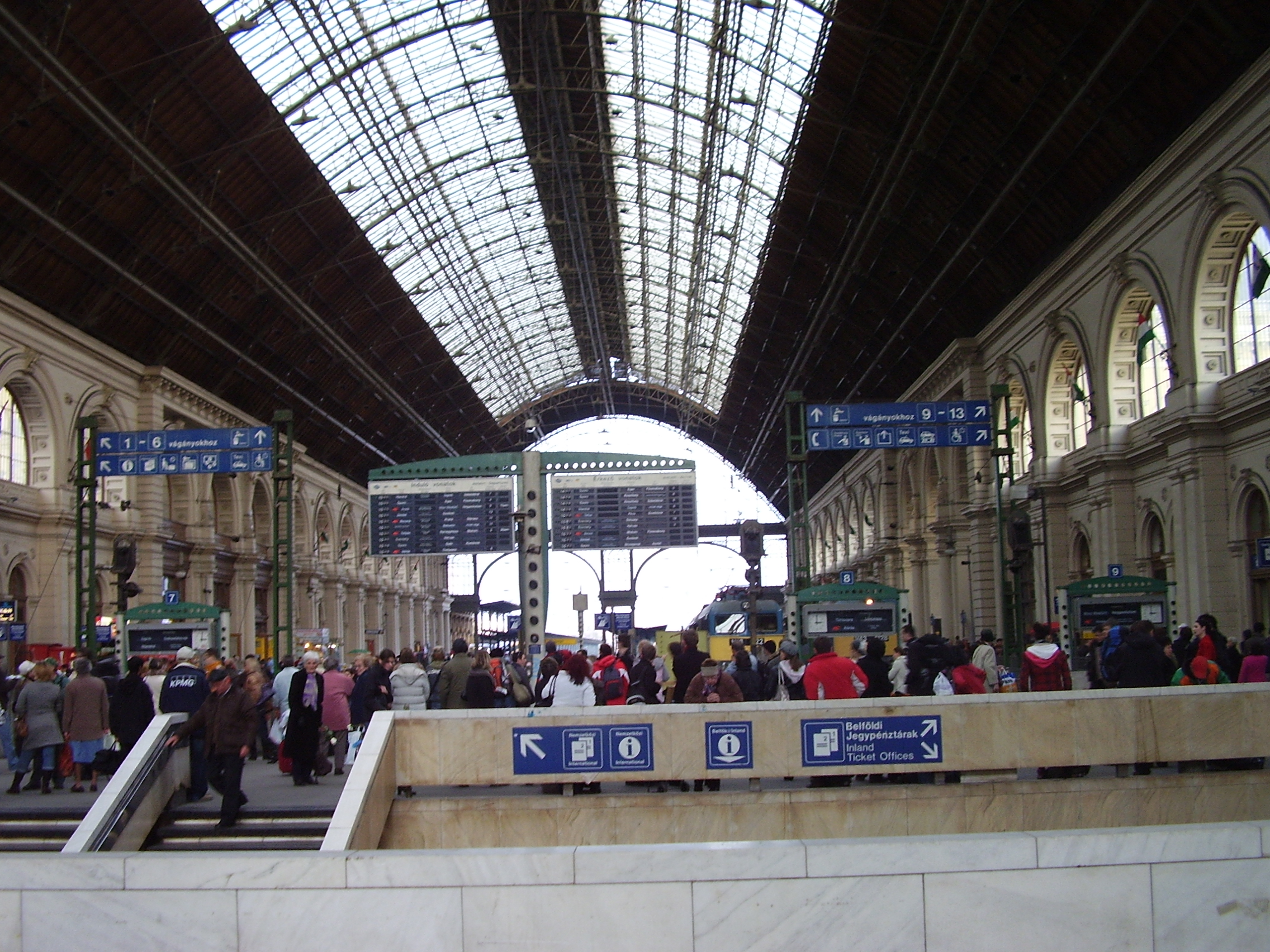 Budapest Keleti station